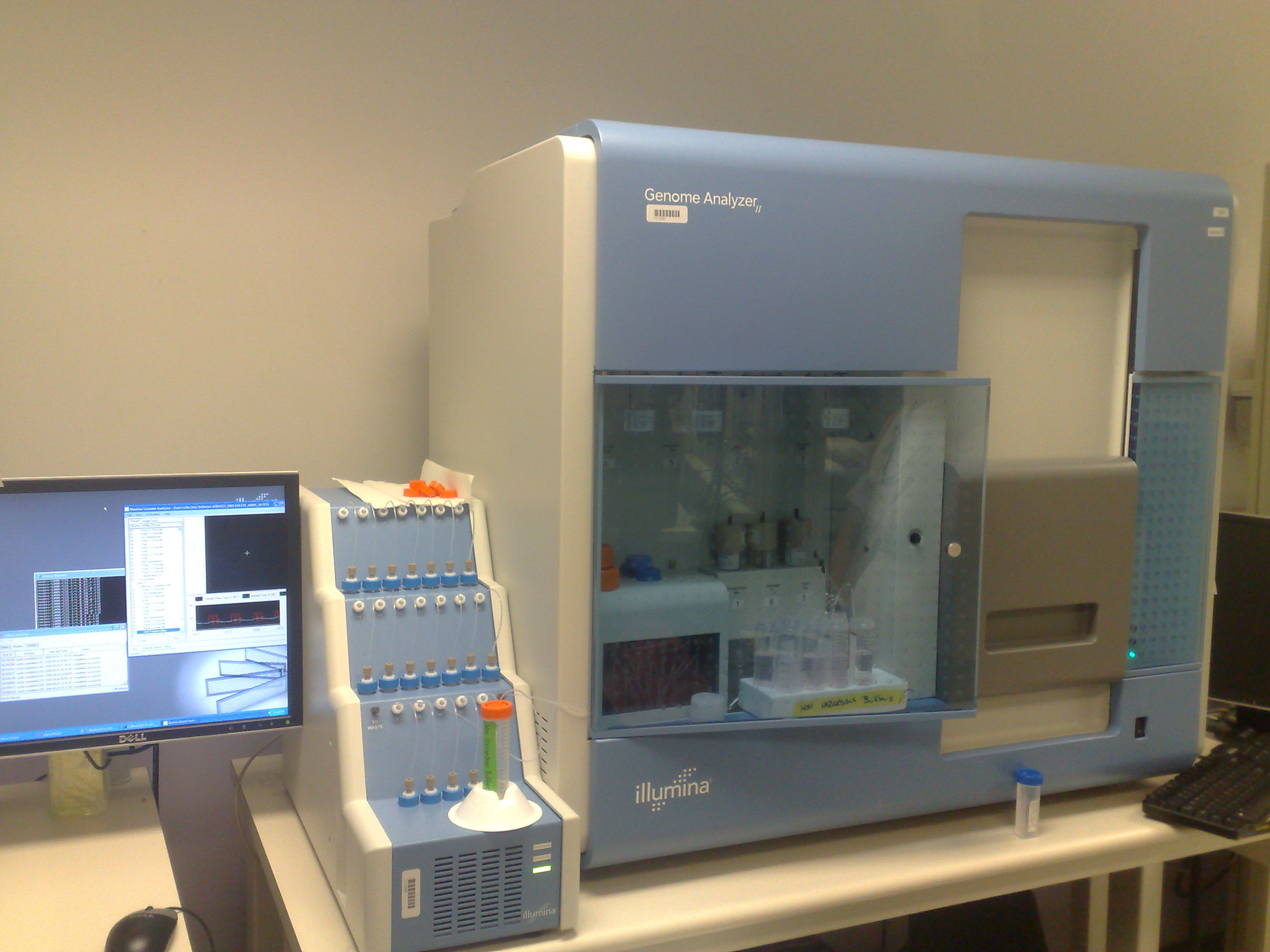 Illumina Gene Sequencing machine